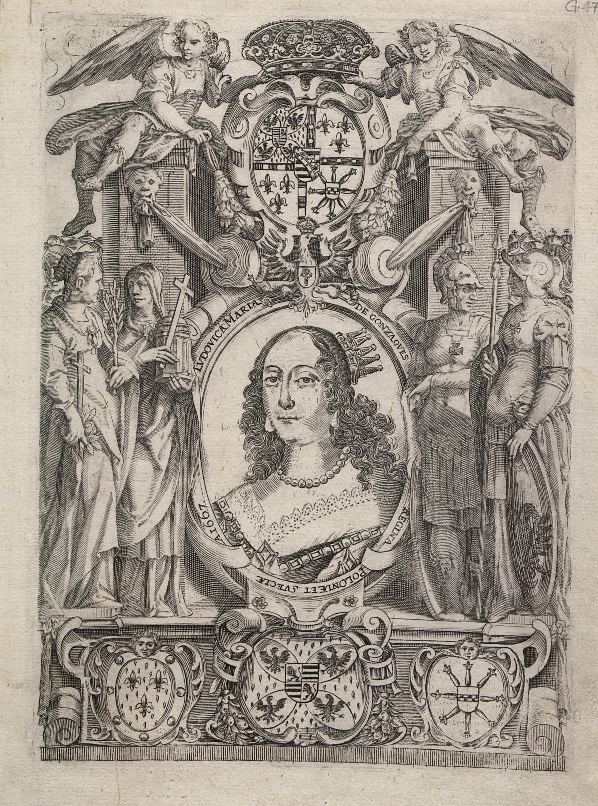 Jan Aleksander Gorczyn, Ludovica Maria de Gonzagues Regina Poloniae et Sveciae 1667